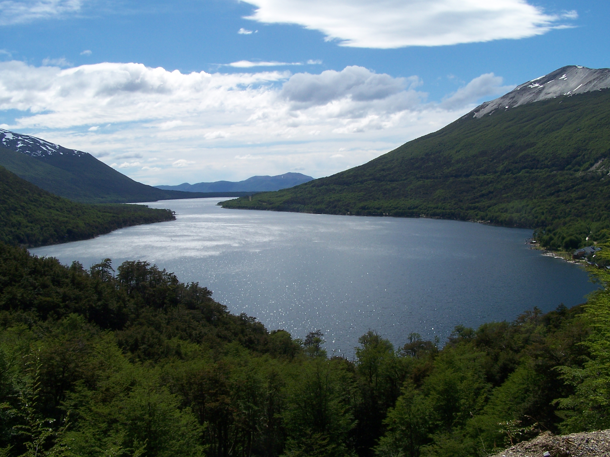 Escondido es un lago de origen glaciar